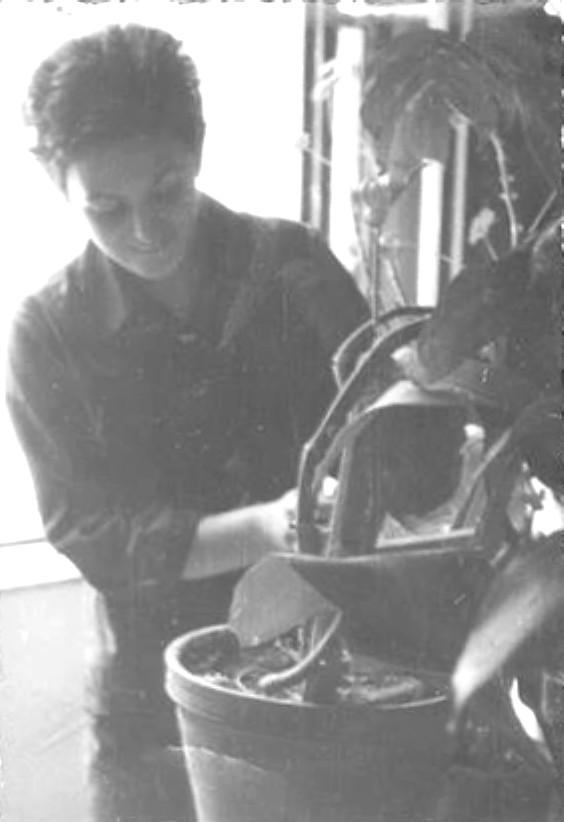 Франка,сестра Станко Мольнара, домашнее фото